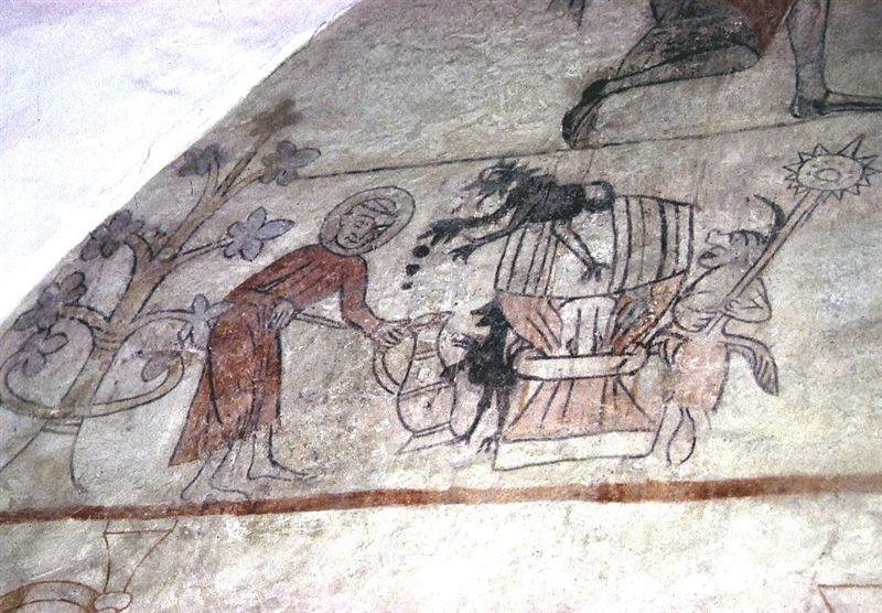 Ørslev Kirke (Slagelse Kommune) i Danmark. Sydkapellet østvæg mod nord